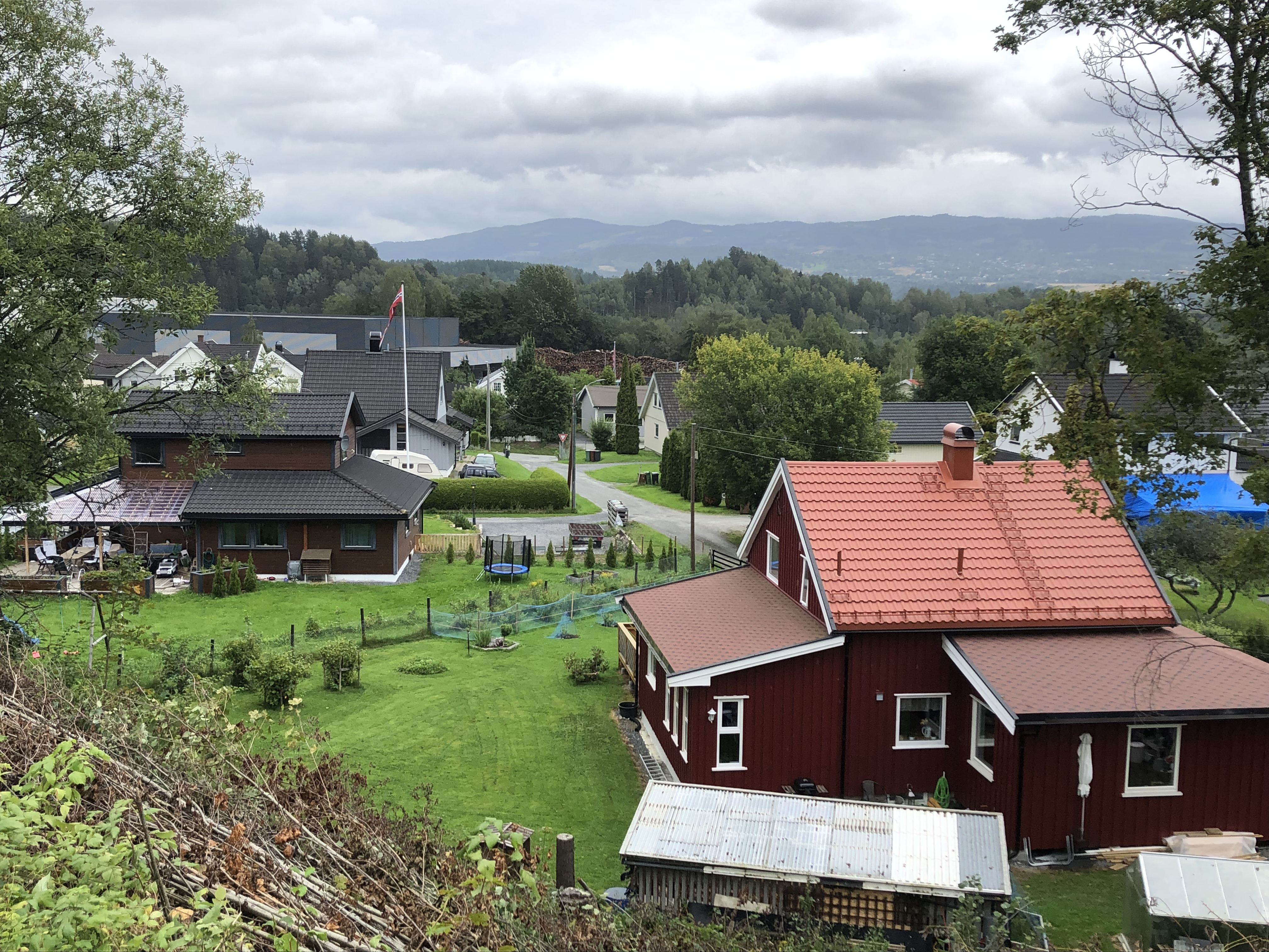 Bjørkeveien, Hønefoss